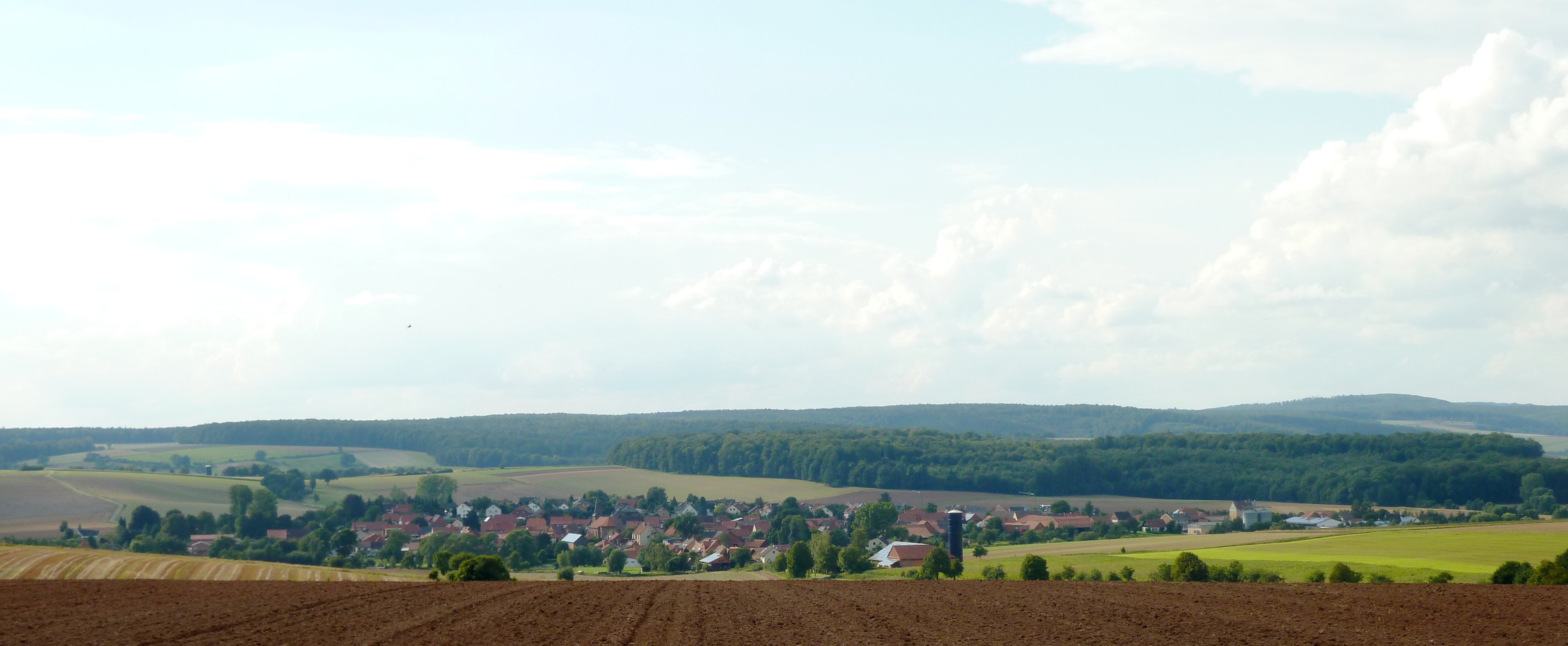 Blick von Osten vom Höherberg auf Bodensee, Landkreis Göttingen, Südniedersachsen. Hinter dem Ort der Mühlenberg, im Hintergrund Teile des Nörtener Waldes (links) und der Langfast (rechts)